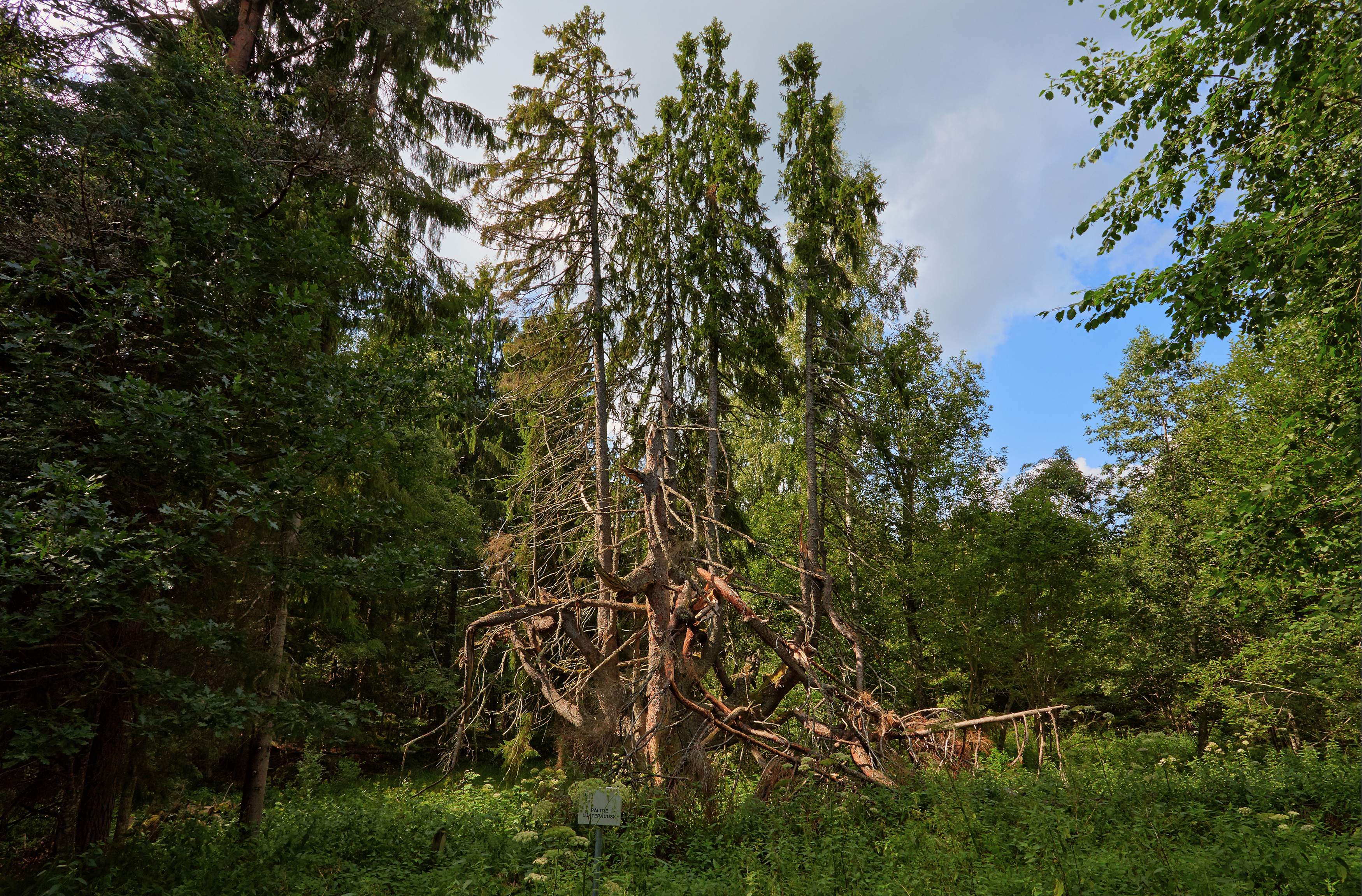 Pältre lühterkuusk 2013. aasta augustis.